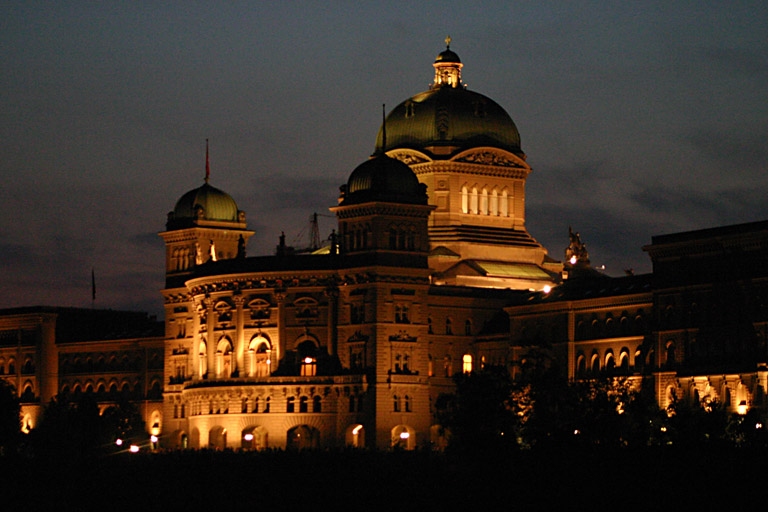 Bundeshaus Bern in der Nacht